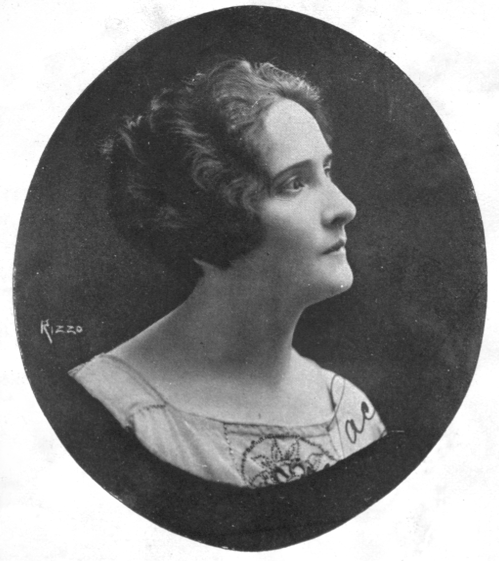 Retrato da anarcofeminista brasileira Maria Lacerda de Moura.